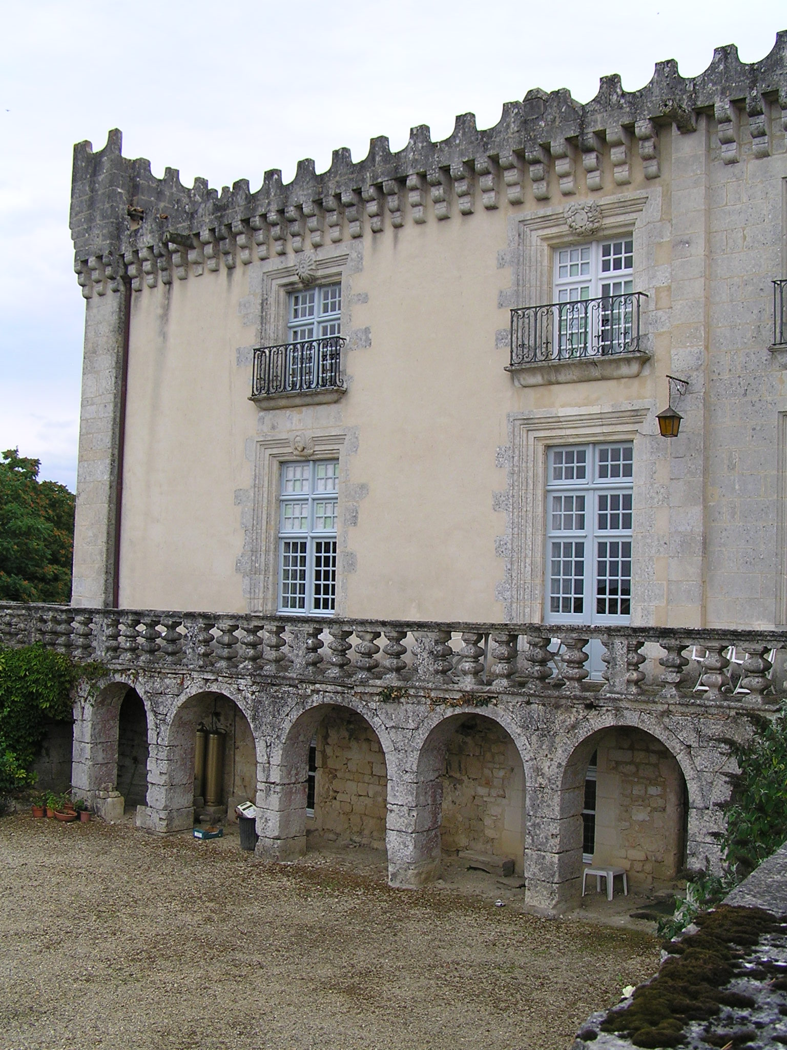 château de Fleurac à Nersac